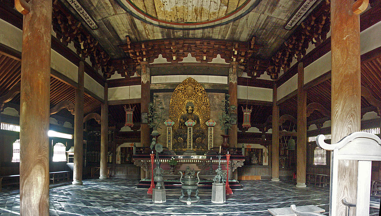 Daitoku-ji Temple , 大徳寺 仏殿